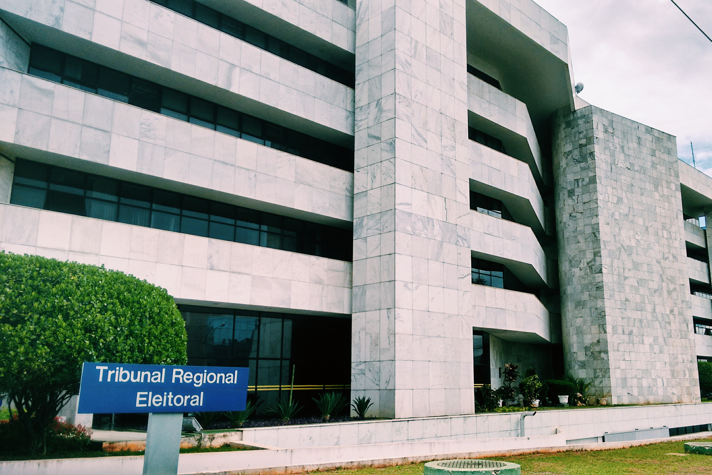 Vista do edifício-sede do Tribunal Regional Eleitoral do Distrito Federal (Brasil)